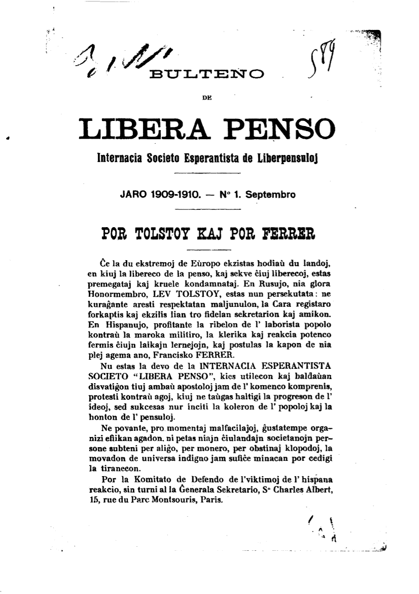 Unua paĝo de la revuo, kun teksto defende al Tolstojo k Ferero.